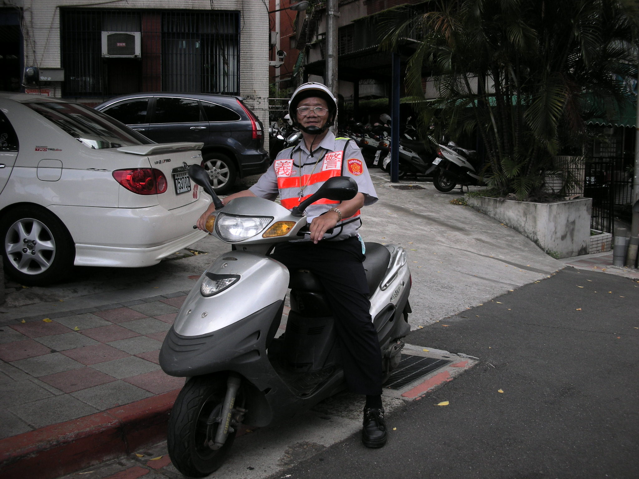 中文（台灣）: 臺北市義勇警察大隊隊員騎鈴木機車。